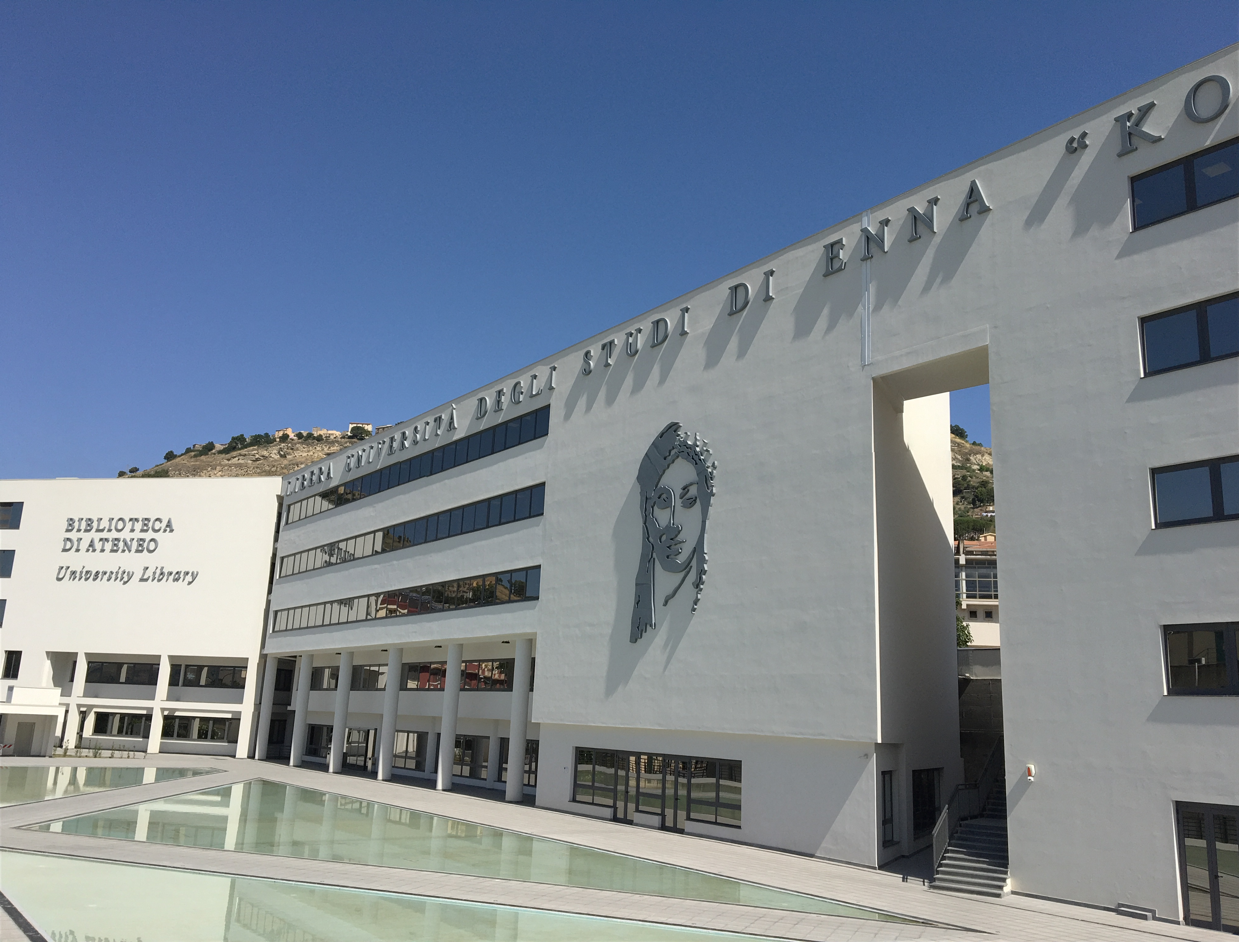 La nuova Biblioteca della Kore, opera di particolare pregio architettonico, è divenuta il simbolo stesso dell'Università